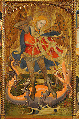 forma part del retaule